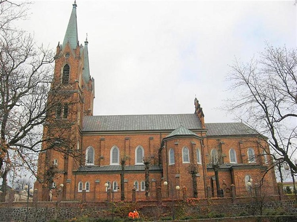 Kutno, ul. kard. Stefana Wyszyńskiego 4 - kościół parafialny pw. św. Wawrzyńca, mur., 1883 (zabytek nr 444 z 13.03.1978)